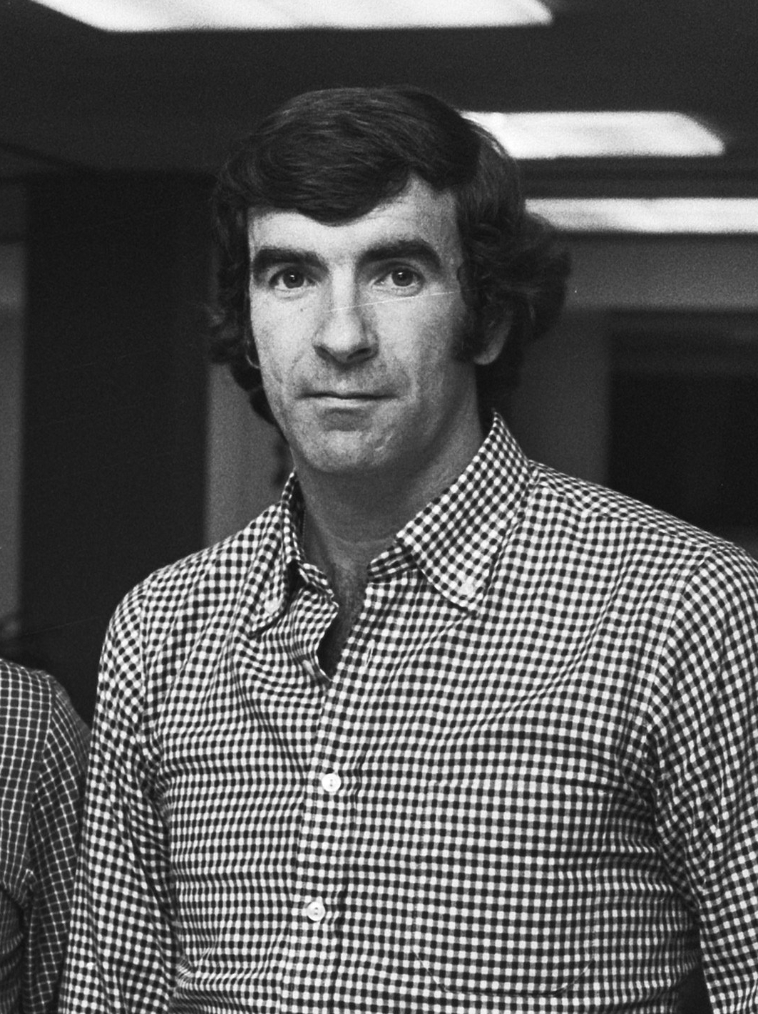 Arrivée de l'Athletic Bilbao à l'aéroport d'Amsterdam-Schiphol. Le gardien de but Iribar. Photographie par Bert Verhoeff / Anefo.